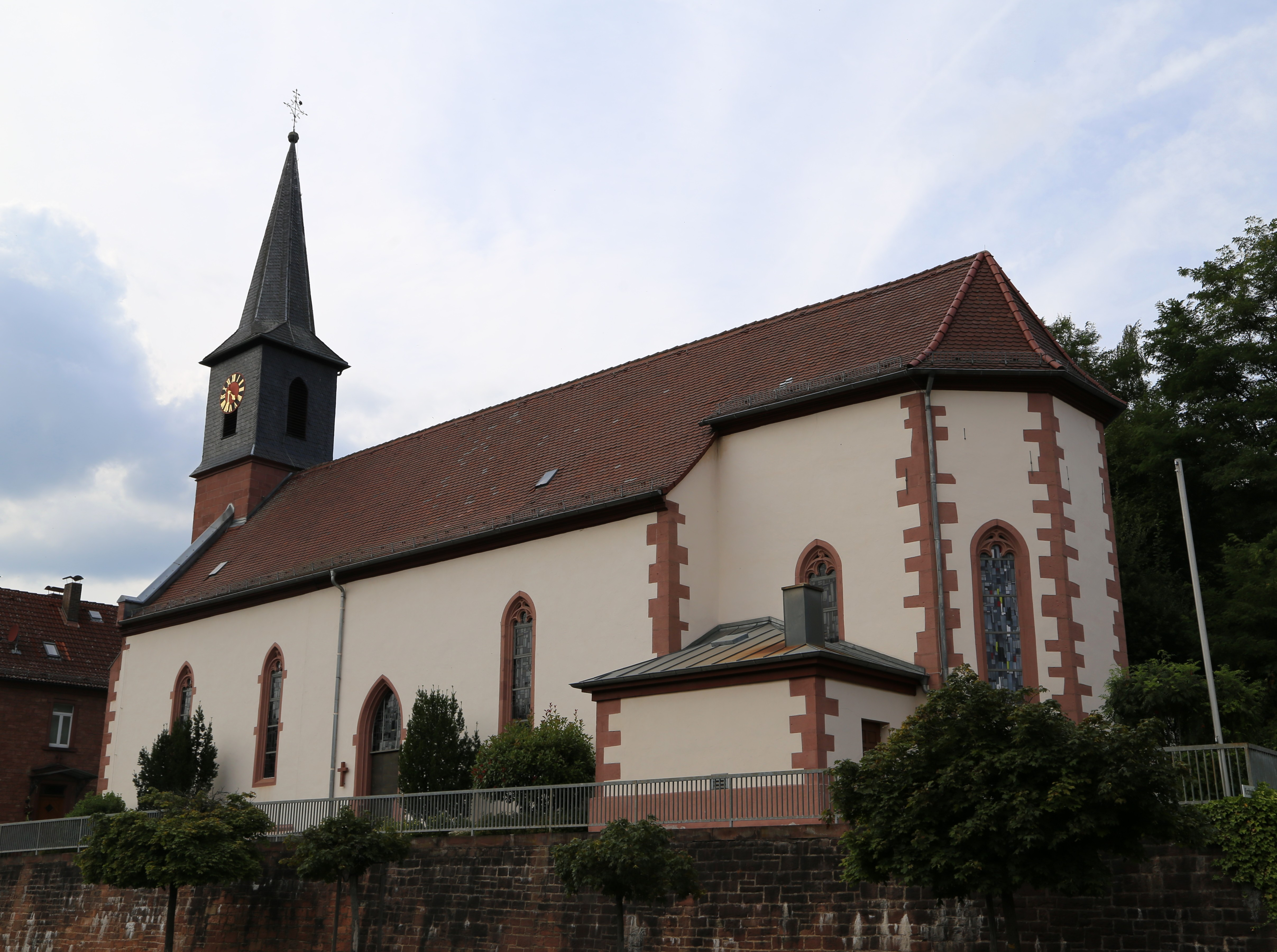 Wintersbacher Str. 69a, Wintersbach, Dammbach; Katholische Pfarrkirche St. Valentin, 17. Jahrhundert, 1892 umgestaltet